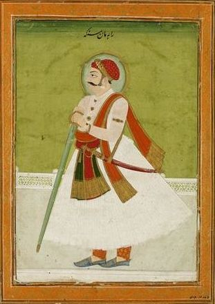 Raja Man Singh